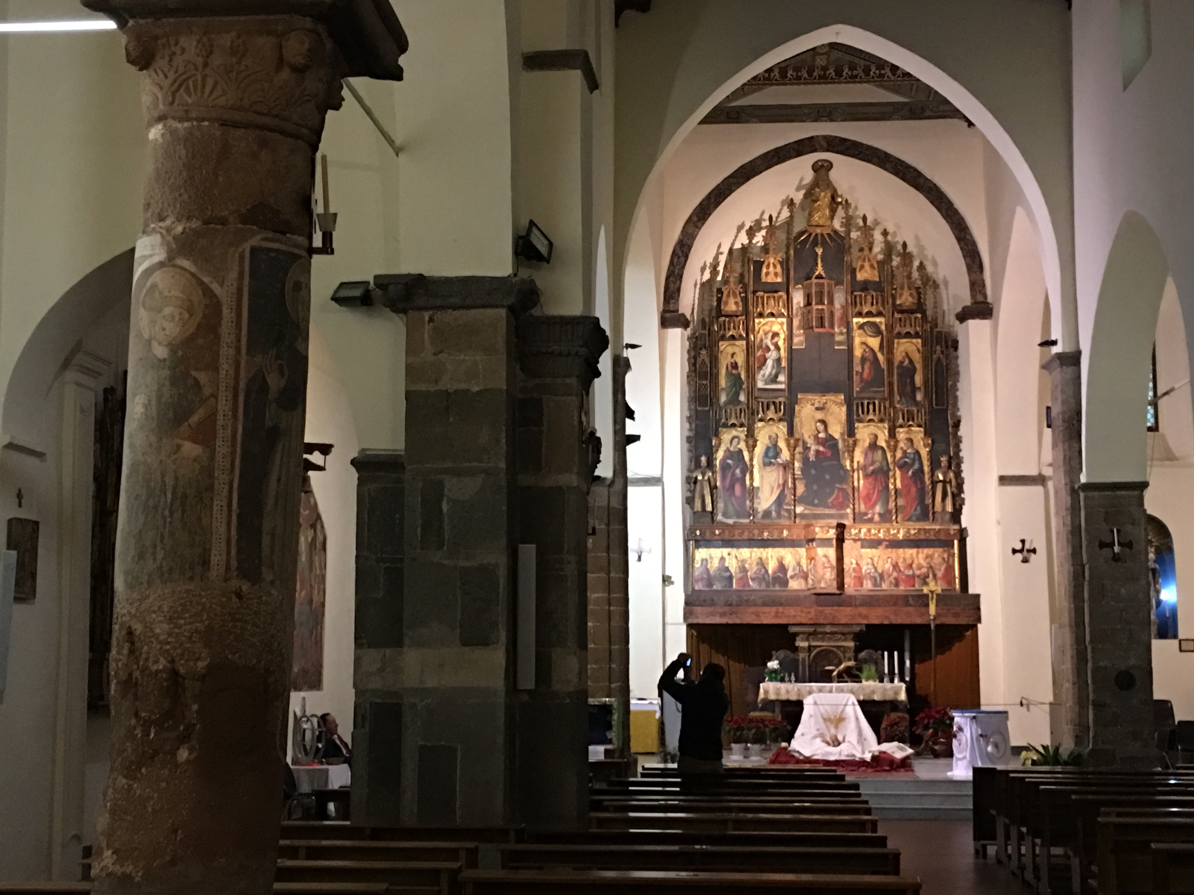 Gli interni della chiesa di Maria Santissima Assunta, o "matrice vecchia", a Castelbuono